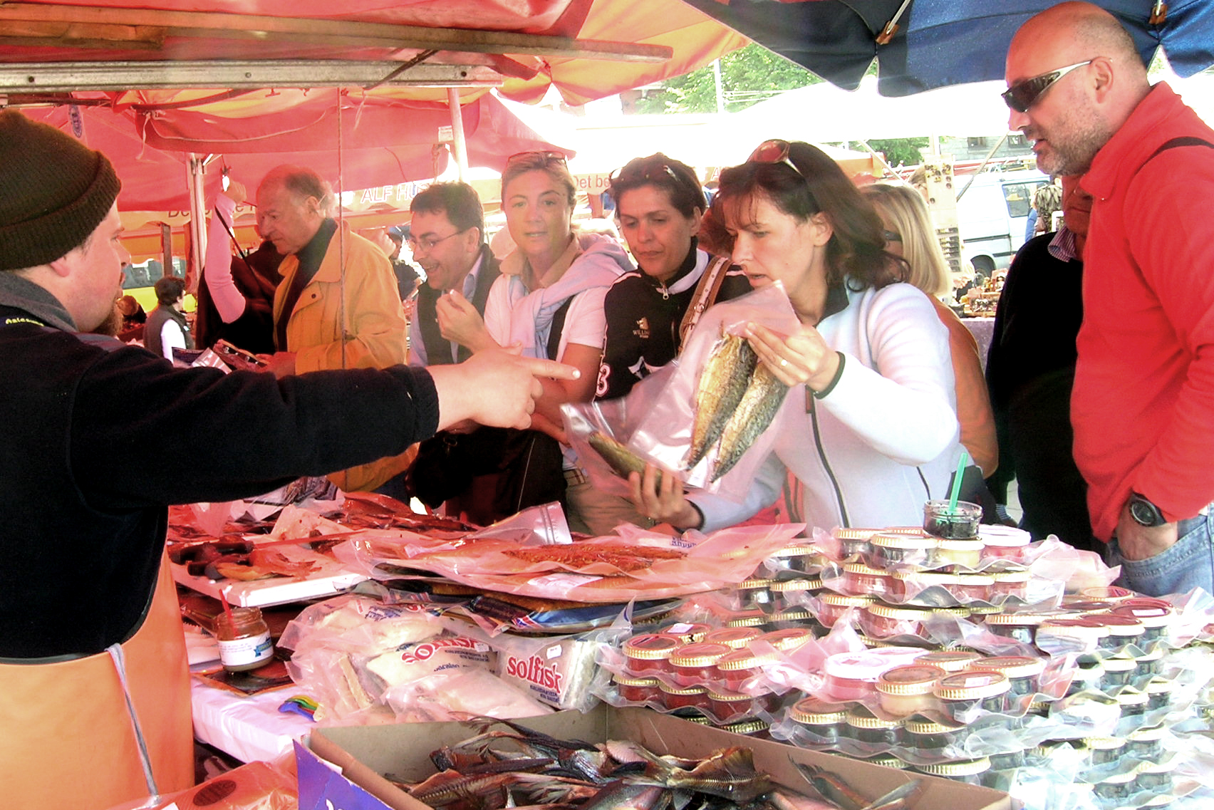 Fëschmaart zu Bergen (Norwegen).